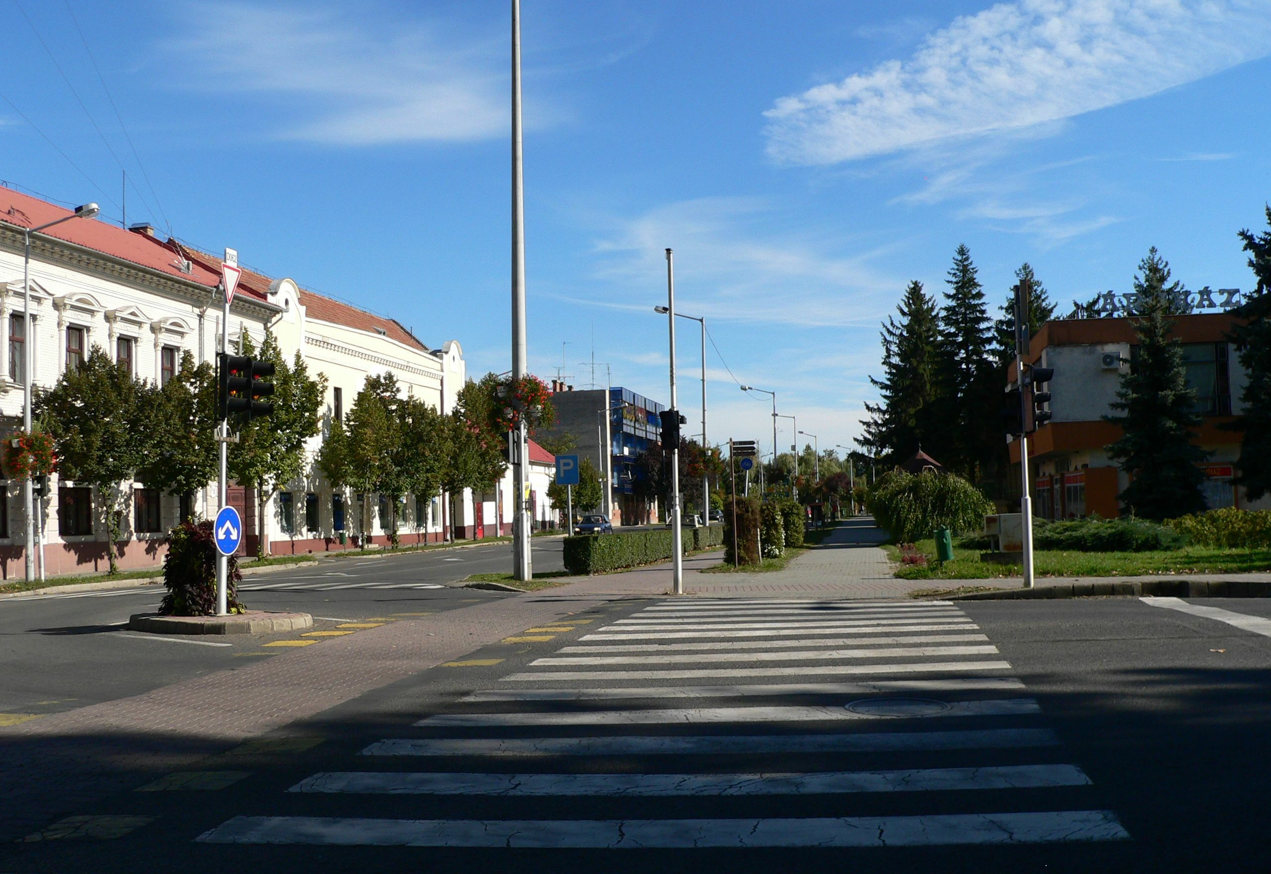 Sarkad központja